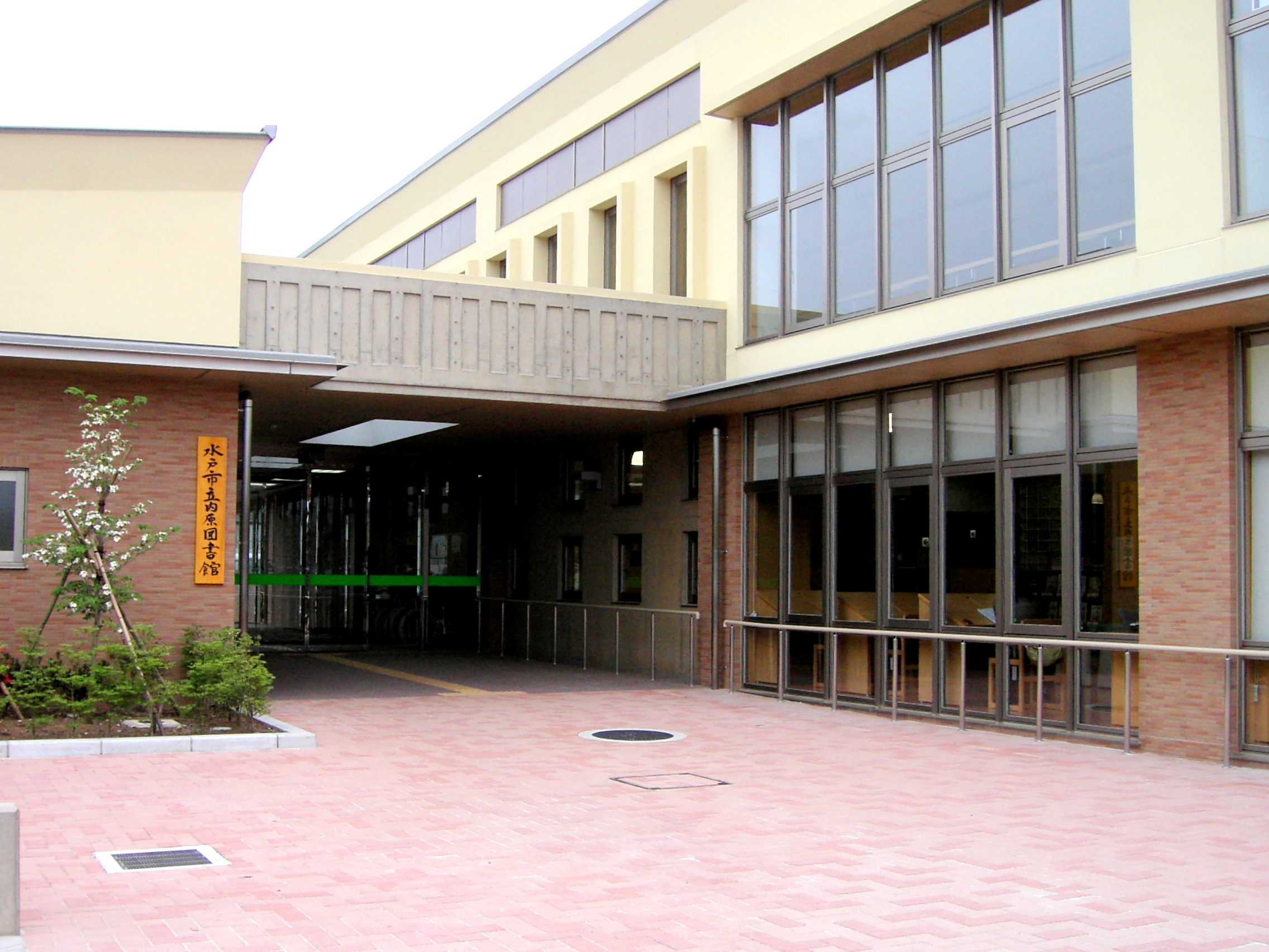 水戸市立内原図書館。